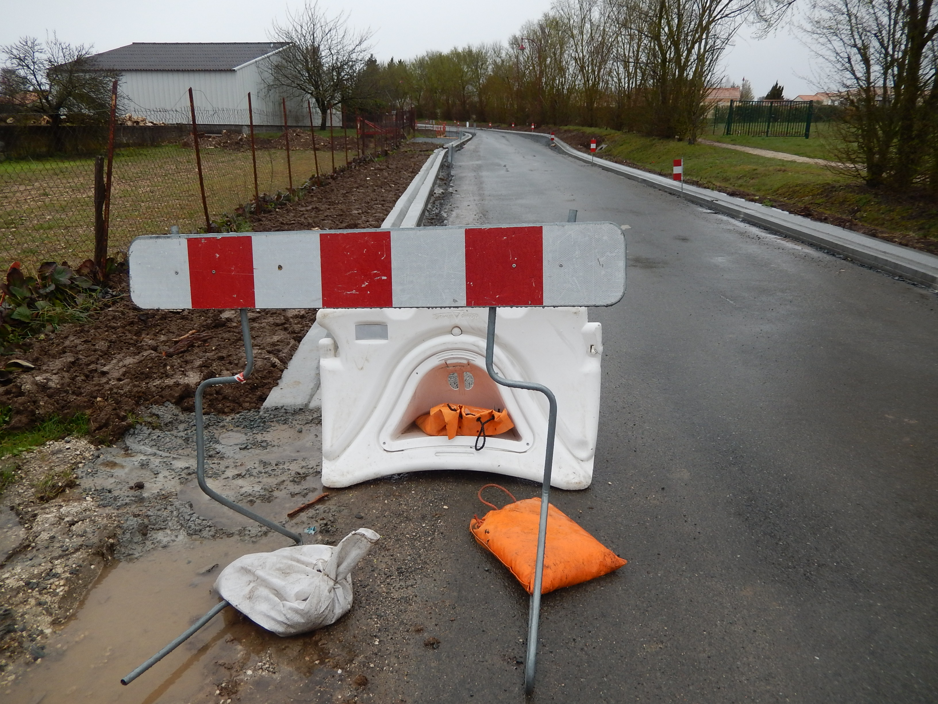 Une balise de délimitation de chantier de type K2 positionnée à Soulignonne, vue côté endroit.